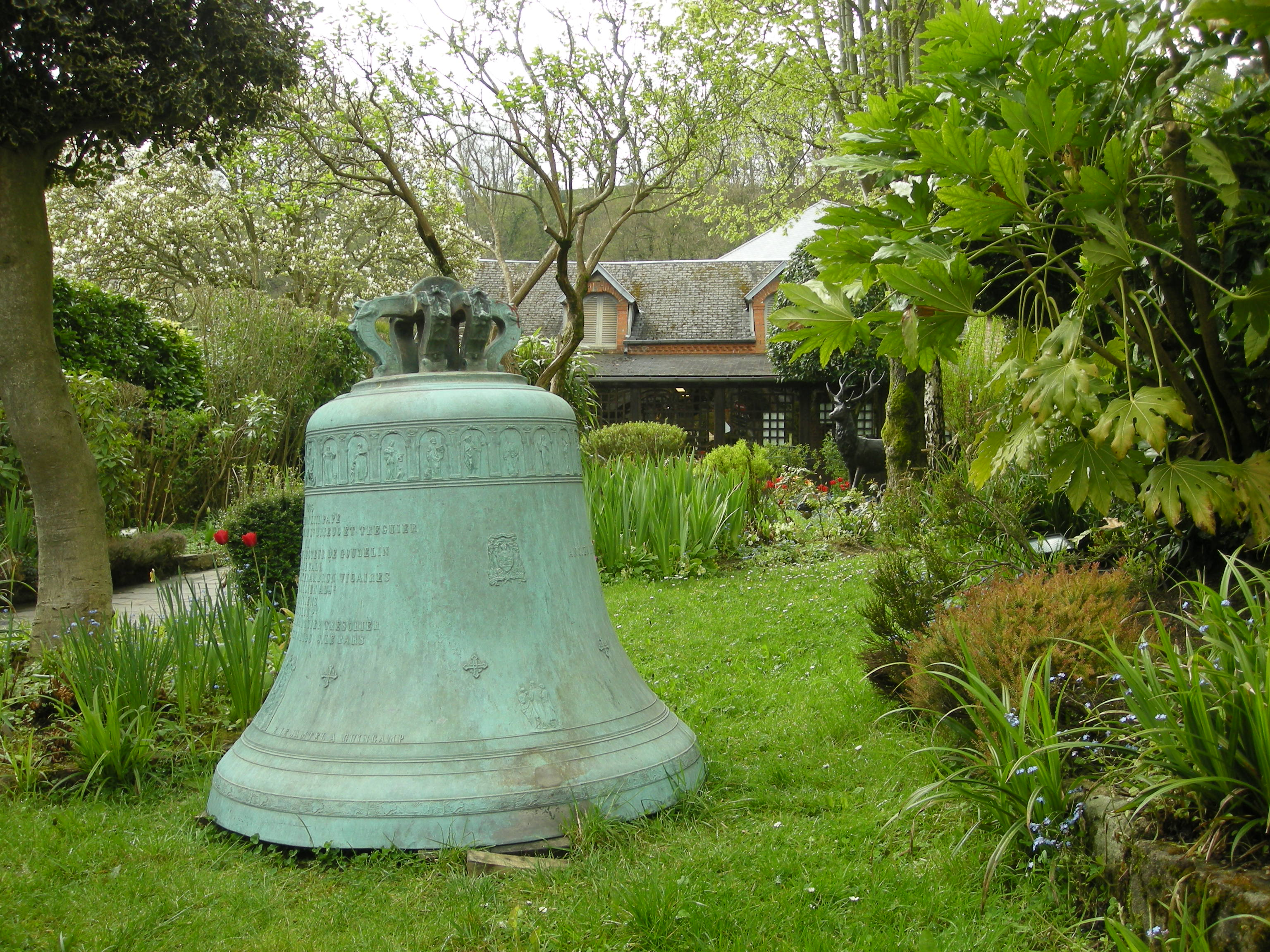 Petit jardin à l'entrée de la Fonderie Cornille-Havard à Villedieu-les-Poêles (Manche, Normandie)